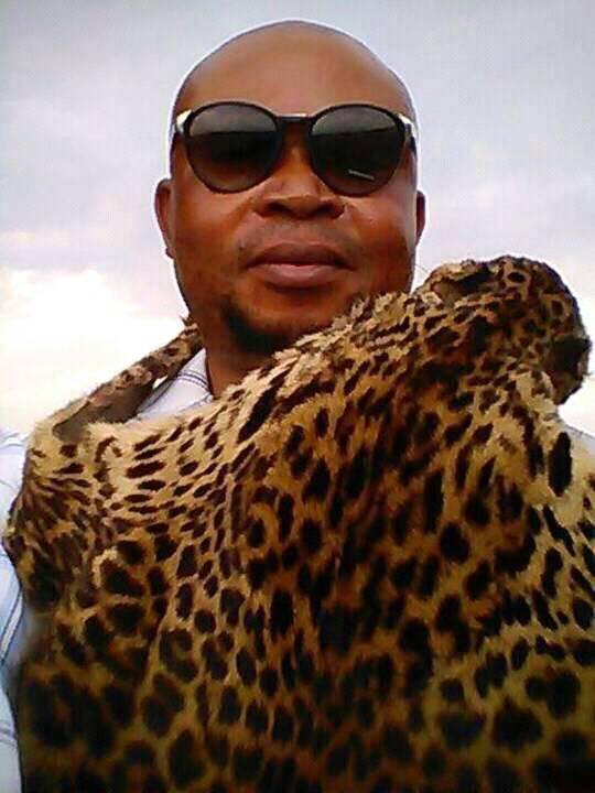 Le roi traditionnel des Bajila-Kasanga, Jean-Pierre Pandi KAMUINA NSAPU exécuté par la dictature kabiliste en août 2016 à Kamuina Nsapu. Secteur de Dibatayi, territoire de Dibaya, non loin de Tshimbulu.